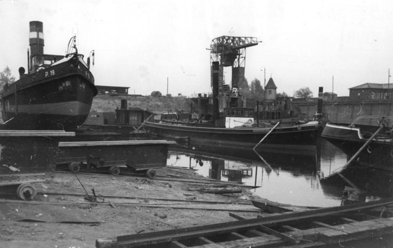 Magdeburg, Rothensee, Staatswerft Aufn.: Illus Biscan 11.12.1950 Aus der Staatsweft Magdeburg - Rothensee Leihweise Illus Berlin W8